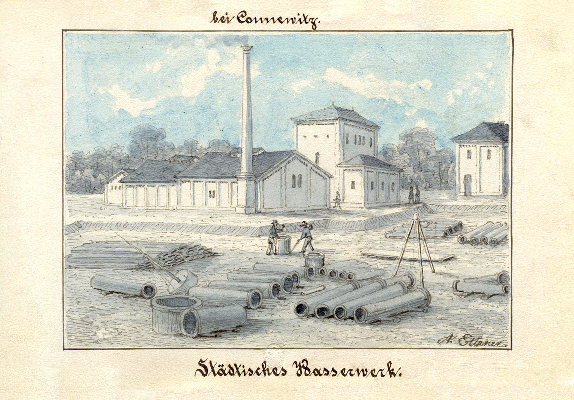 Städtisches Wasserwerk in Connewitz, lavierte Federzeichnung von Adolf Eltzner